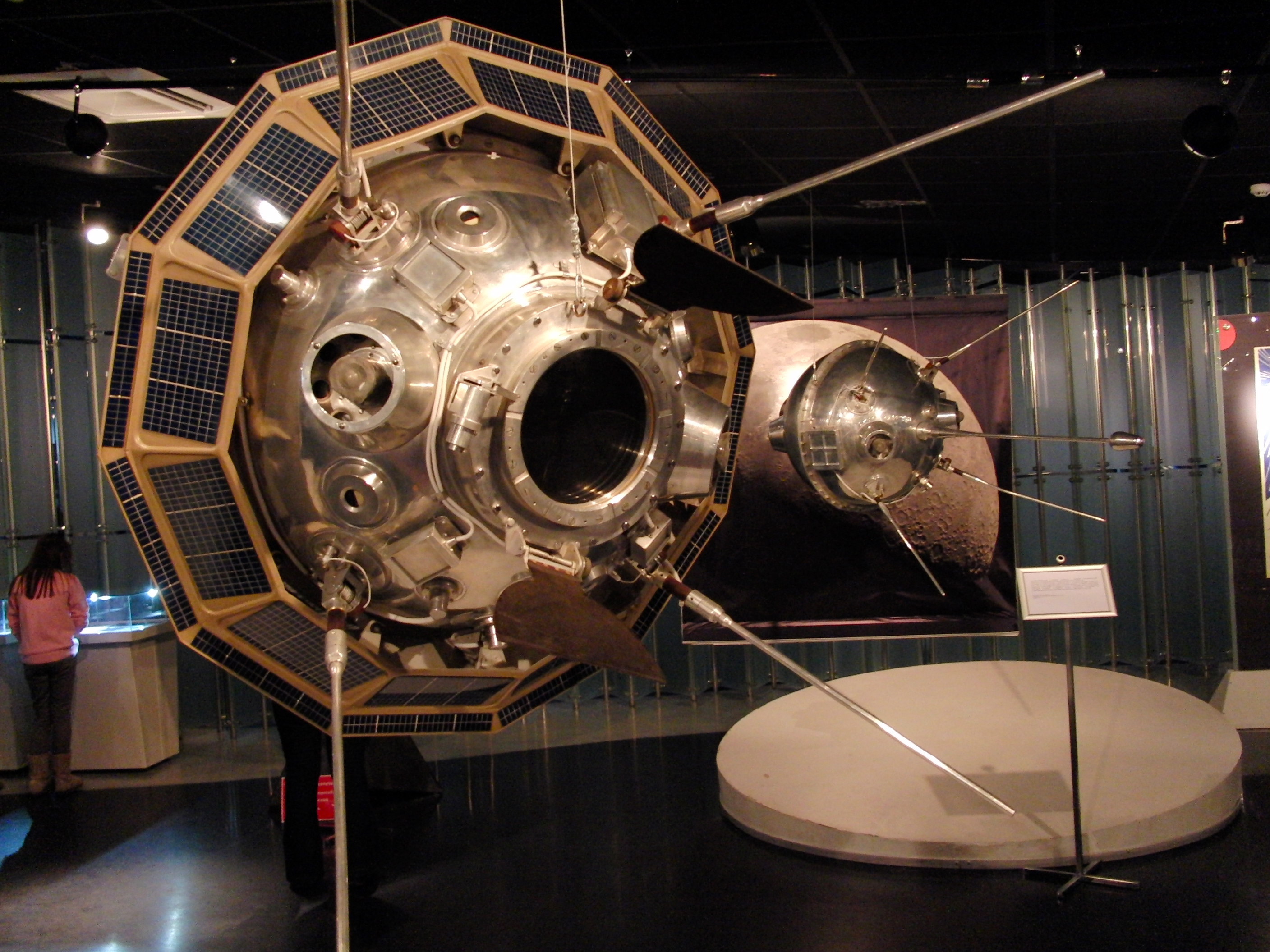 Luna-3, 1:1 model (Луна-3, макет 1:1)